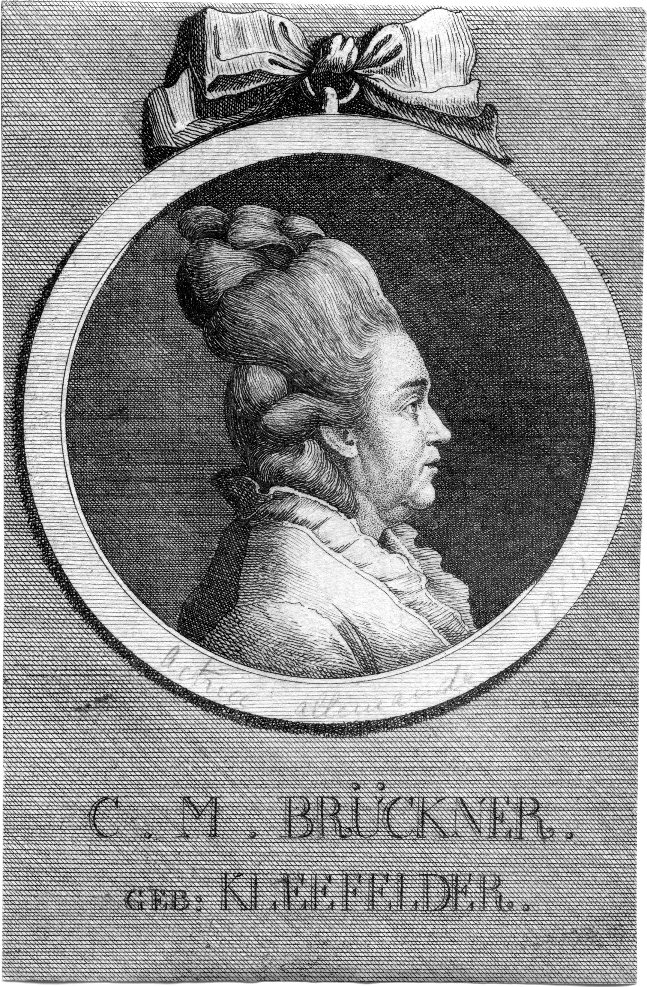 Portrait gravé